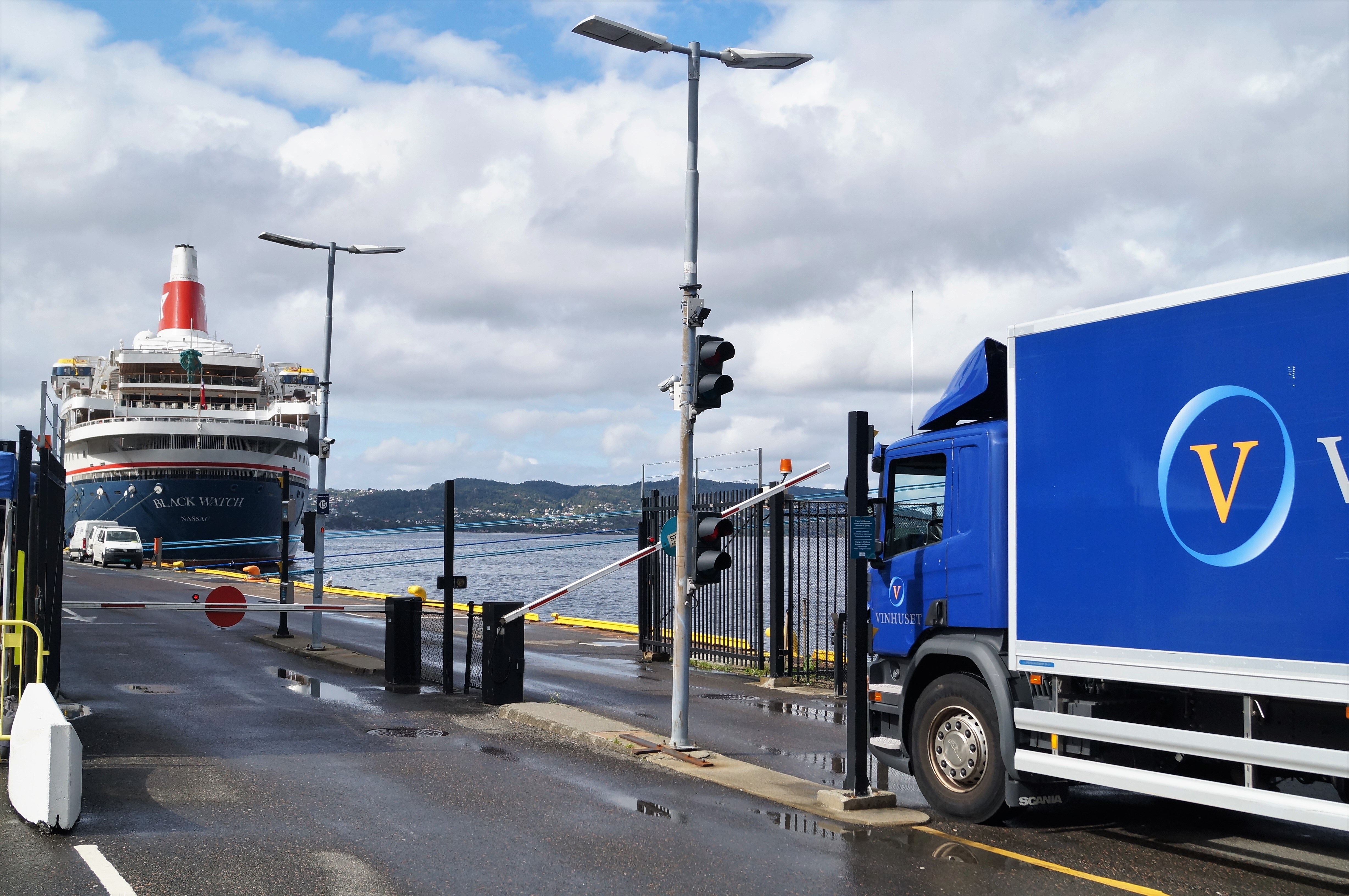 Adgangskontroll ved innkjøring til Skoltegrunnskaien